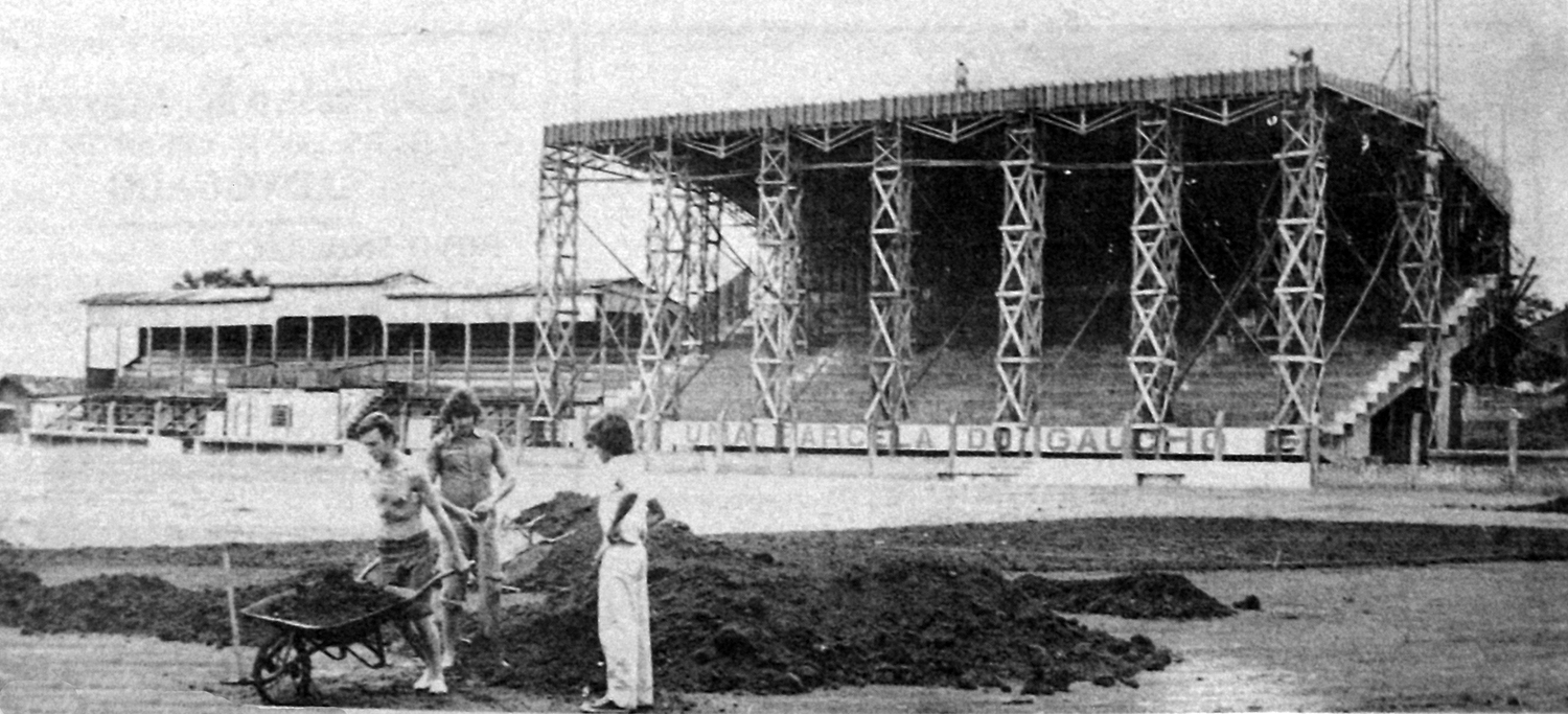 Construção do Pavilhão Honorino Malheiros em 1977